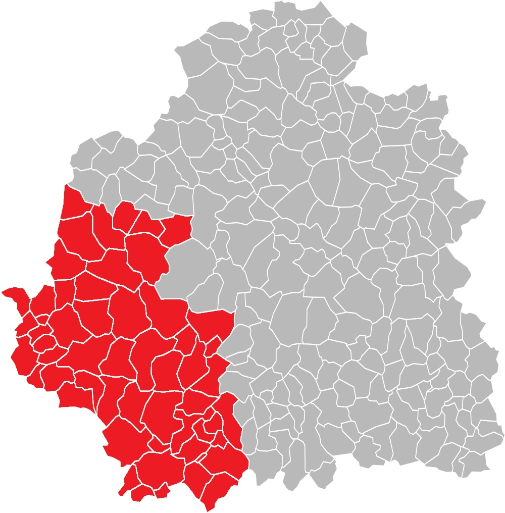 Carte des communes de l'Indre (36) : Arrondissement du Blanc avant 2015.